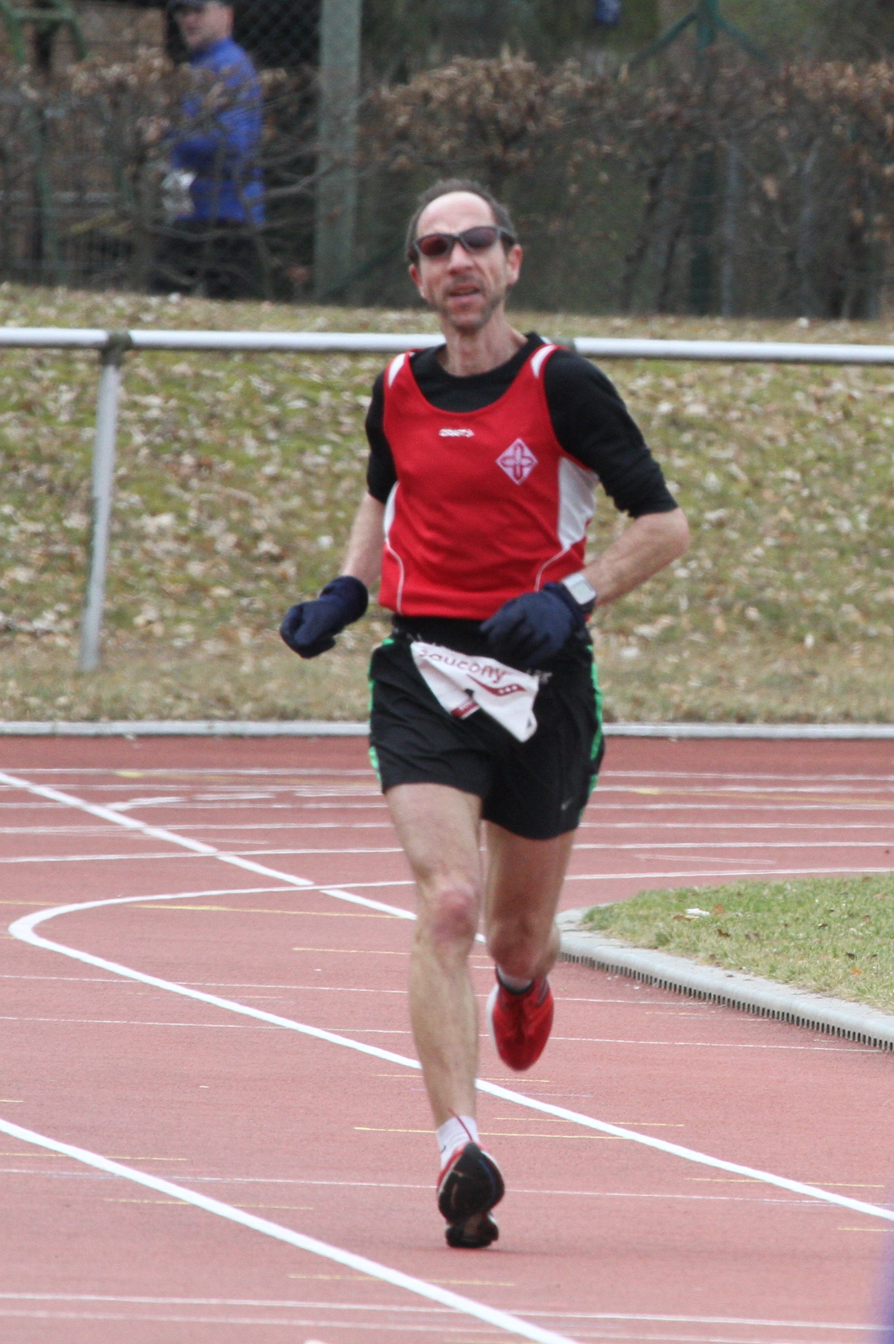 Michael Sommer, der Sieger des Kandel Marathons im Bienwaldstation, aus dem Jahre 2012, kurz vor dem Zieleinlauf.